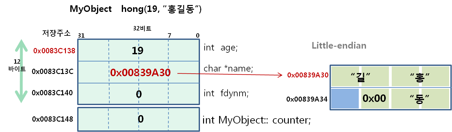 C++ class의 메모리 구조 예제 MyObject